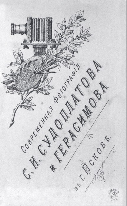 Надпись на обороте старинного фотопортрета